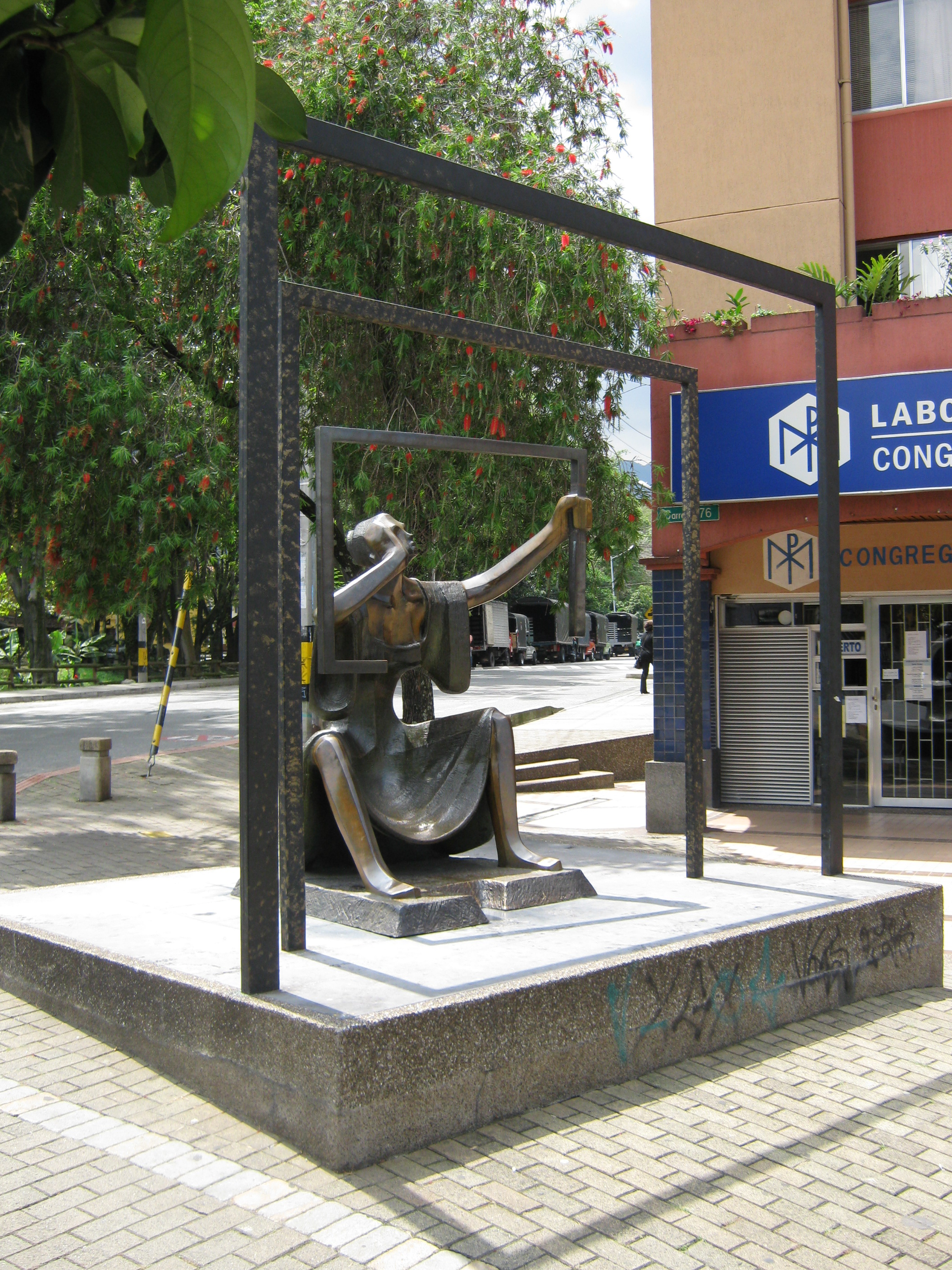 "Dama del Espejo" obra de Salvador Arango M., ubicada en la carrera 76 con la calle 28. Medellin. Colombia.